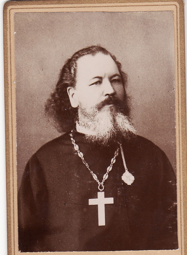 Karp Tiisik, ärkamisaegne ühiskonnategelane